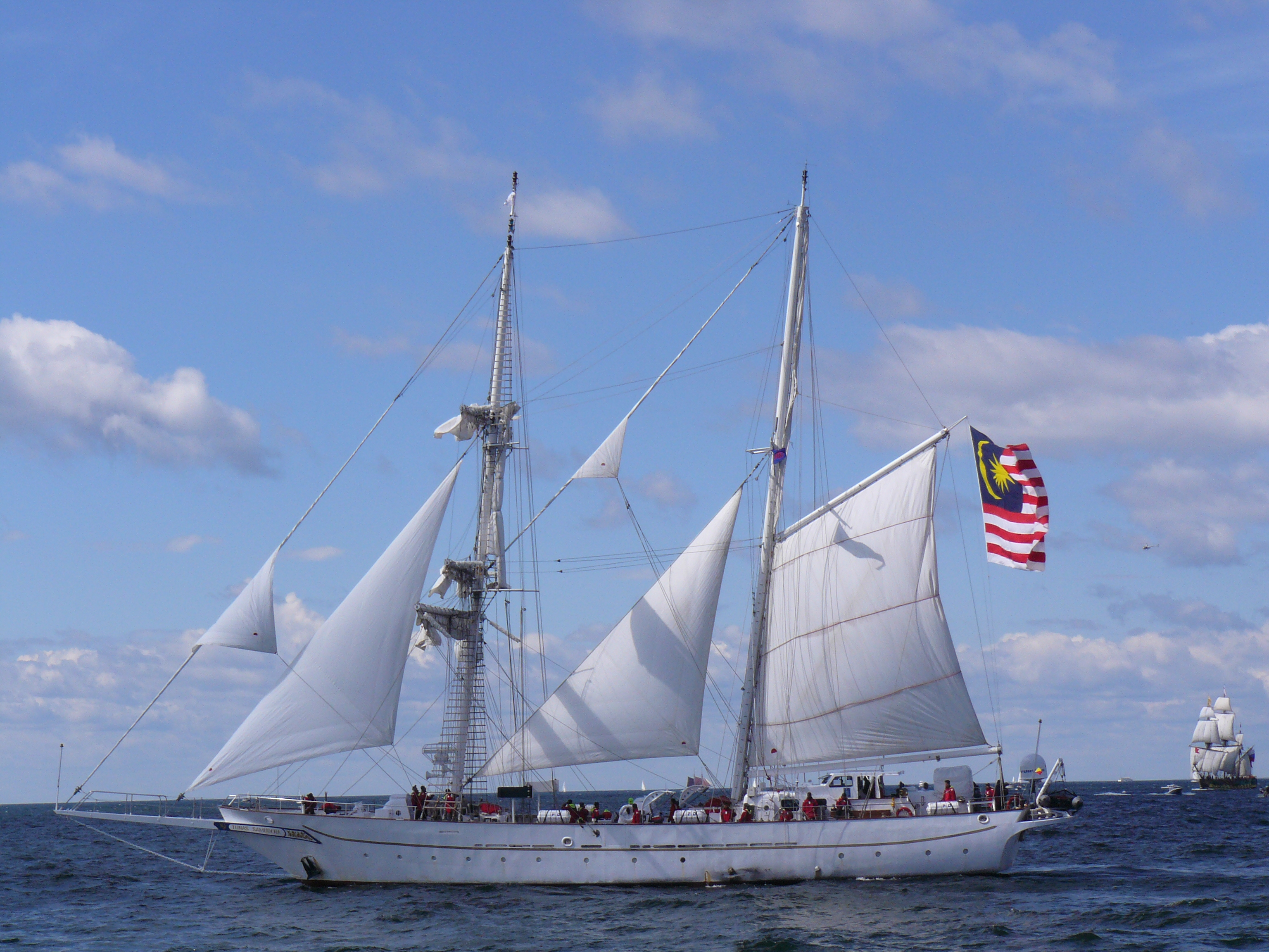 Tunas Samureda